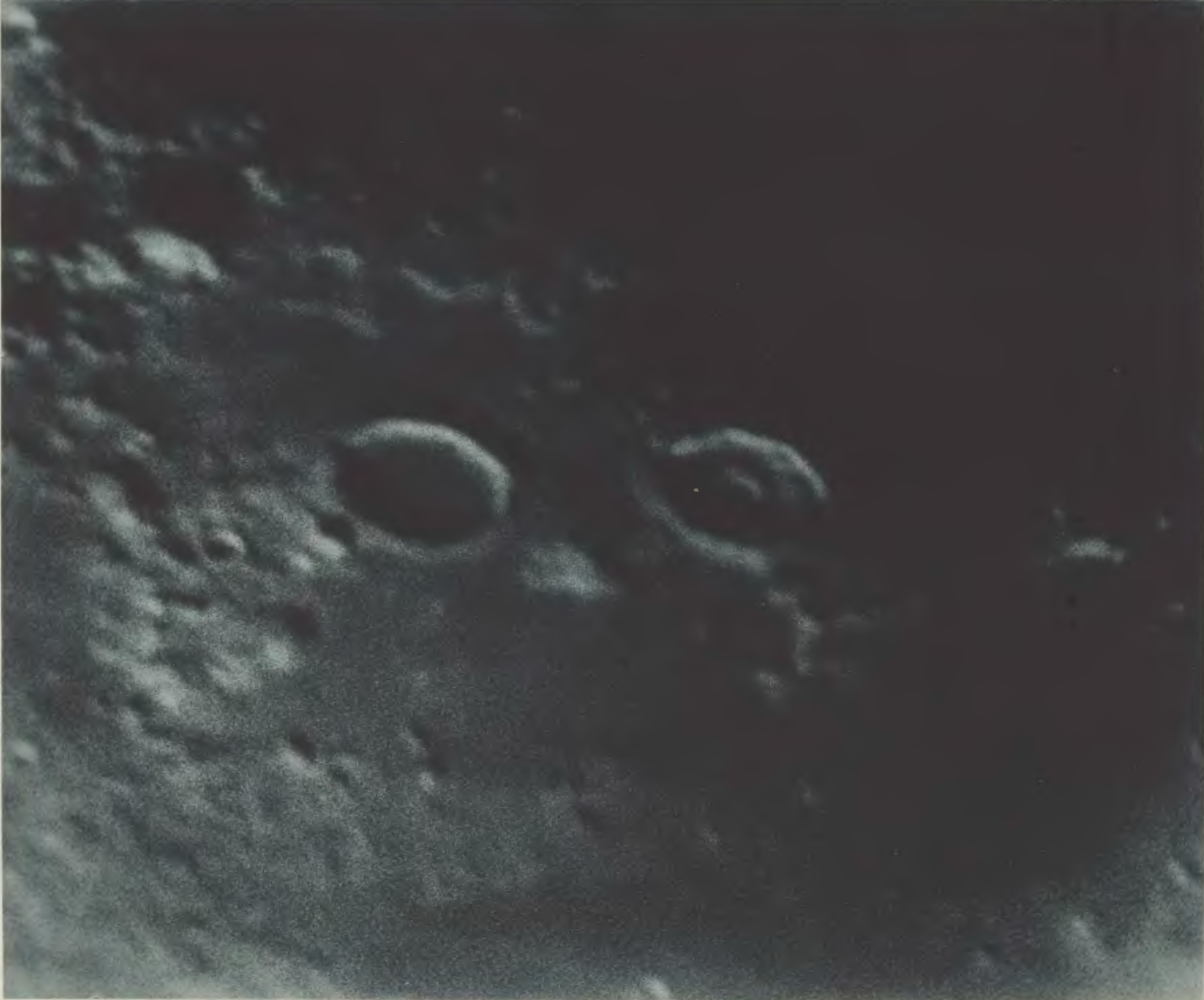 Photographischer Mond-Atlas vornehmlich auf Grund von focalen Negativen der Lick-Sternwarte im Massstabe eines Monddurchmessers von 10 Fuss ausgeführt von Professor Ladislaus Weinek. Heft VIII. Tafel 151